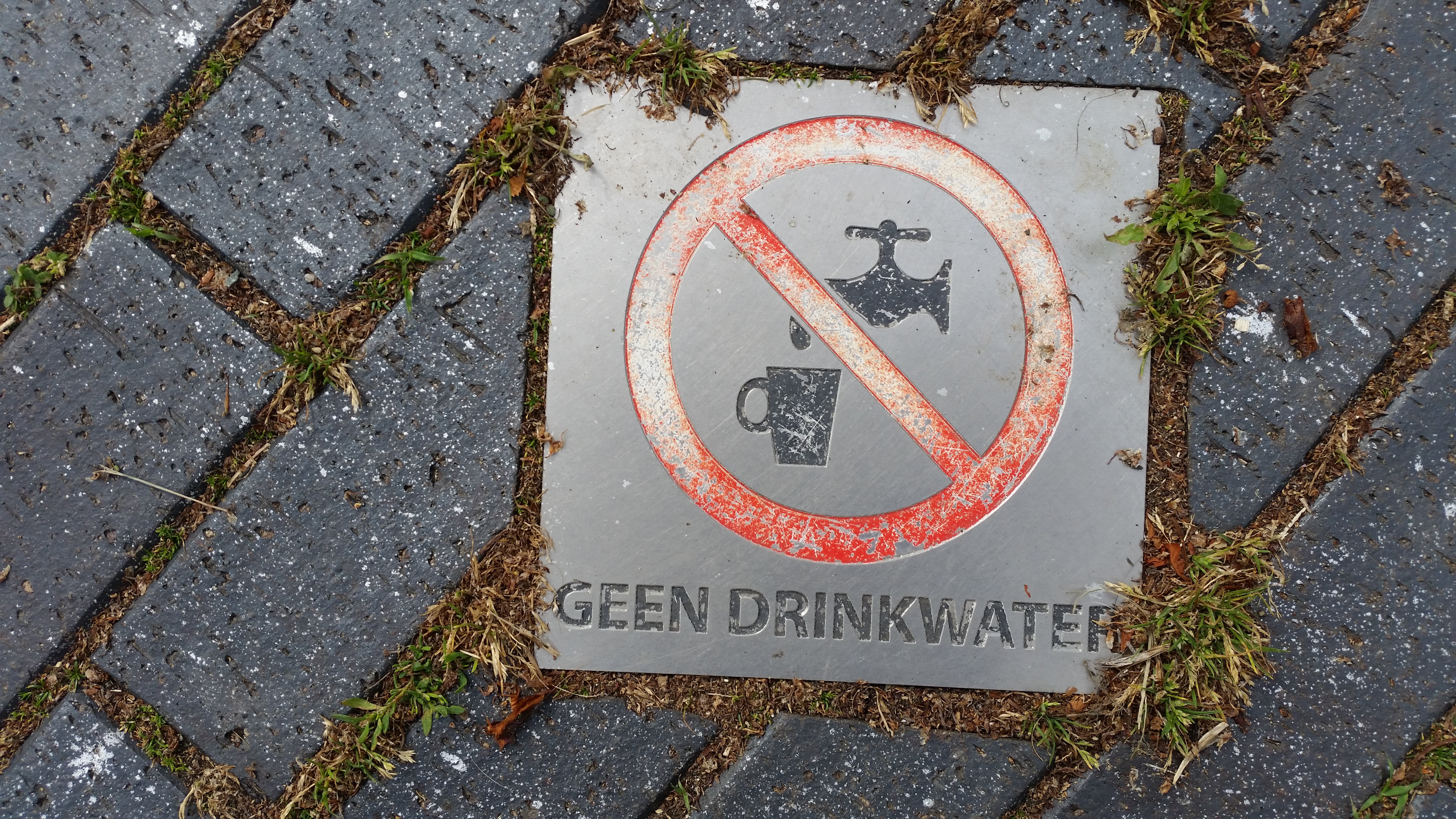 Watertafel Botteskerkpark, waarschuwing geen drinkwater, NB scheve plaatsing ten opzichte van straatklinkers